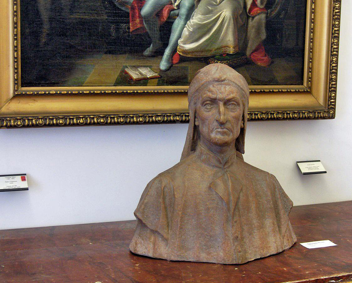 Dante Alighieri by Romeo Pazzini (1855-1936), Museo della città di Rimini.